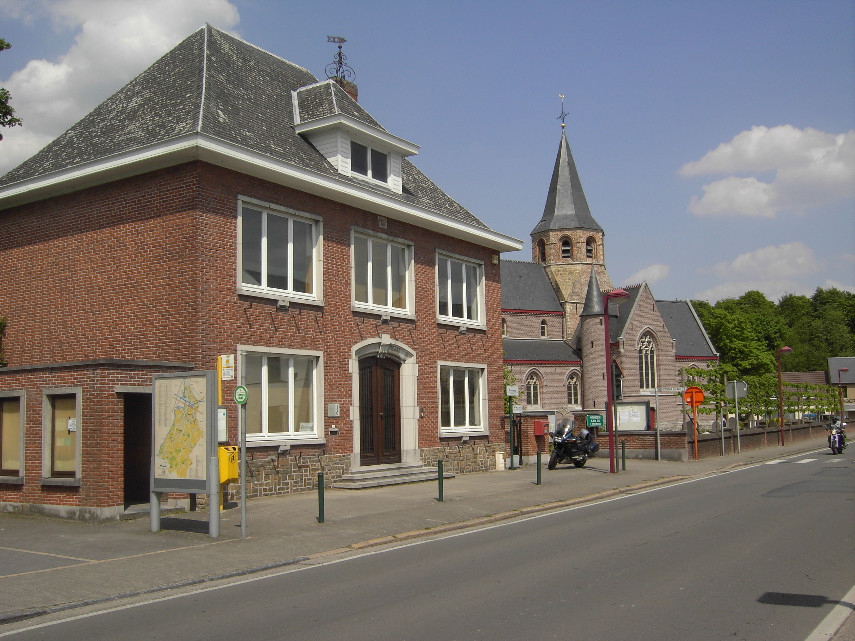 Gemeentehuis en Sint-Martinuskerk - Schelderode - Merelbeke - Oost-Vlaanderen - België